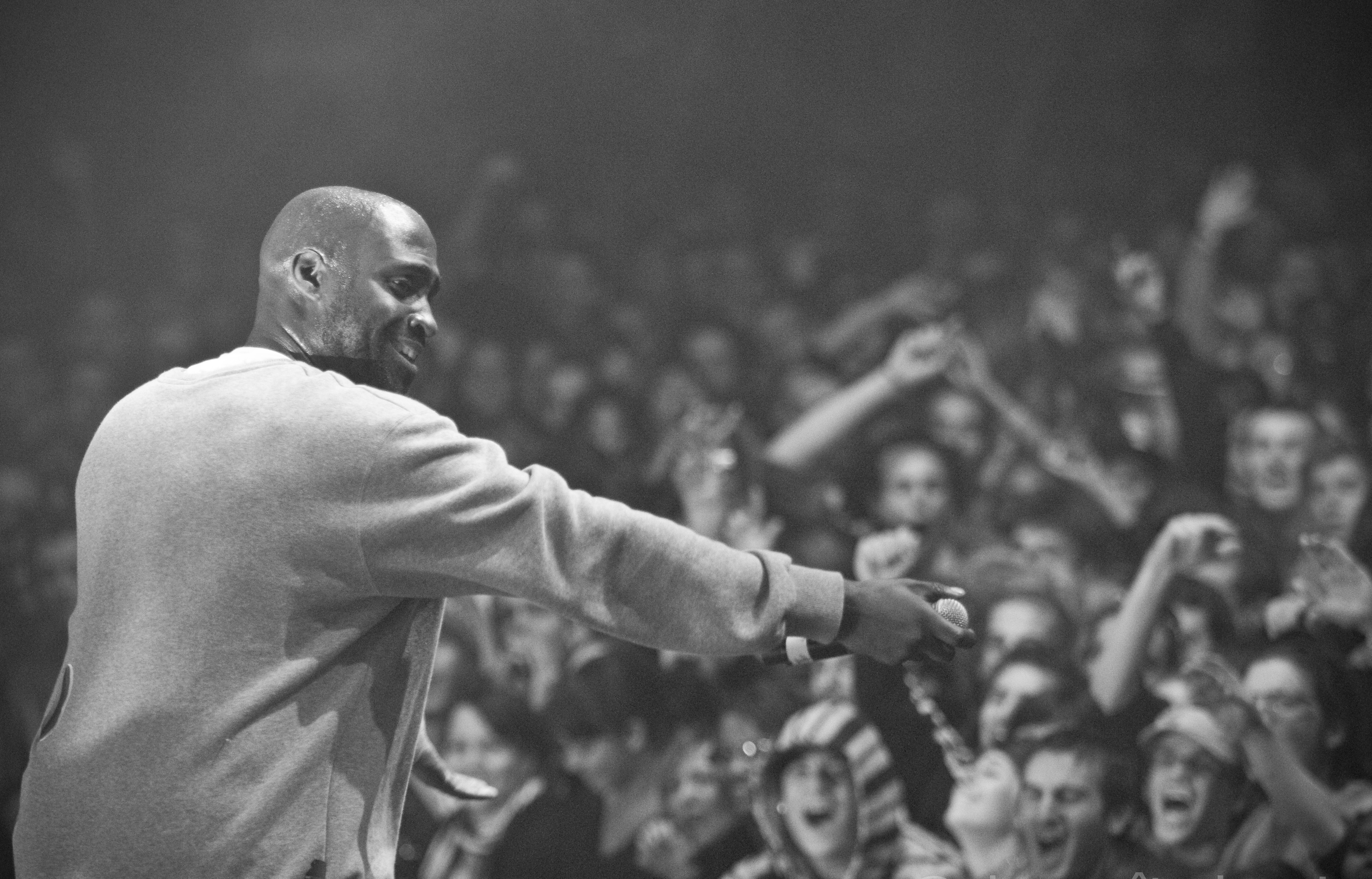 De La Soul live at Marsatac 2008.